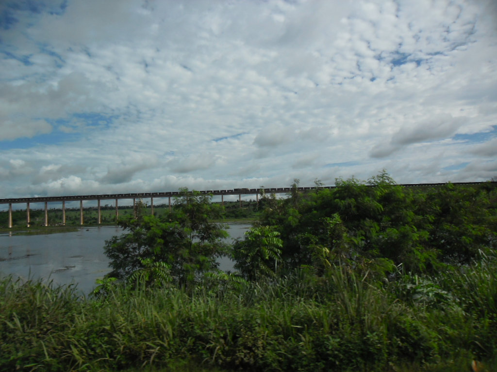 estrada de ferro carajás